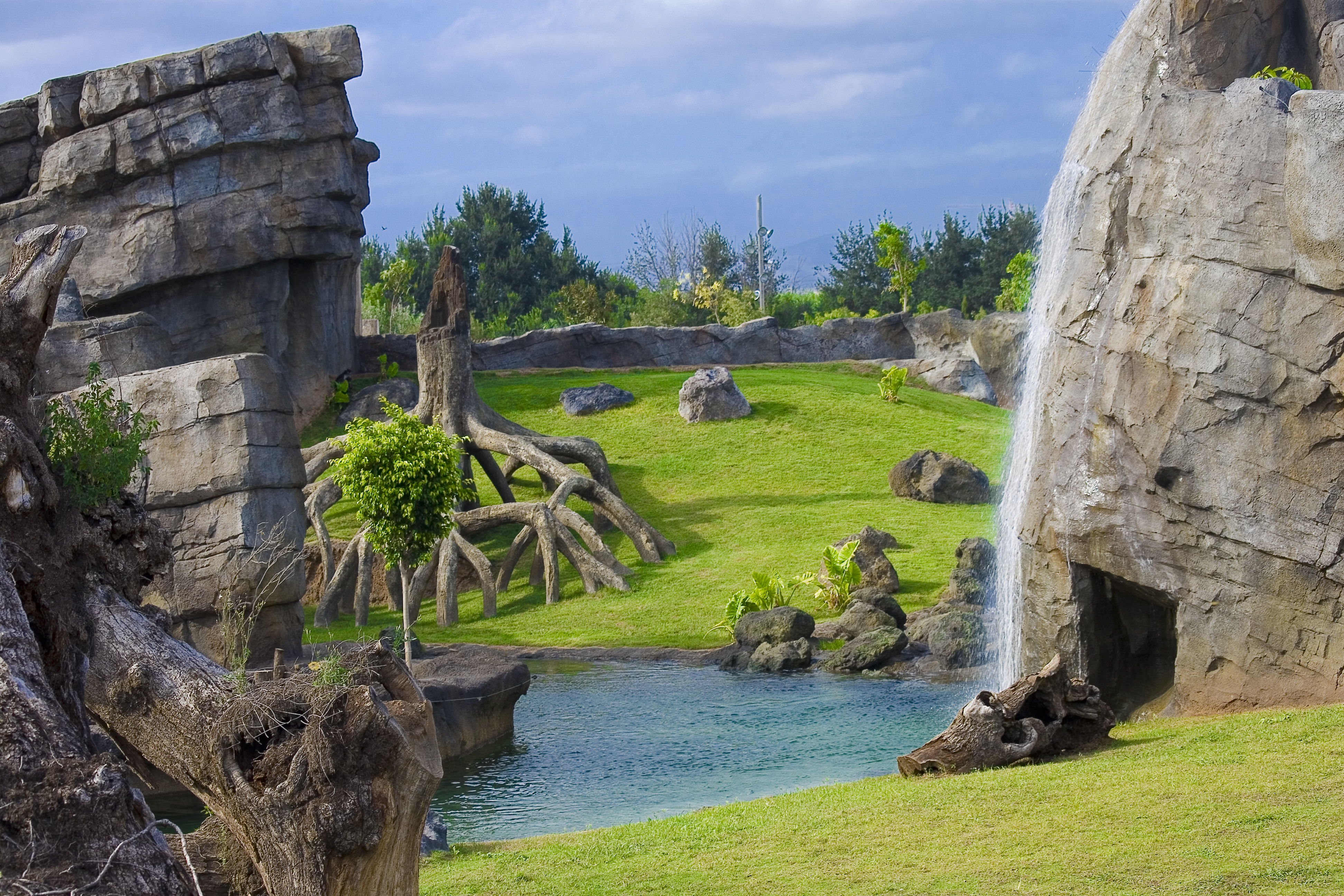 Se puede ver en